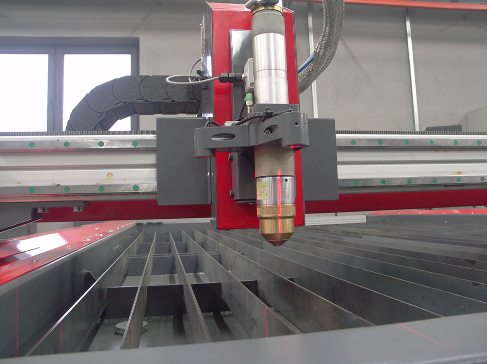 Suport z palnikiem, zamontowany na ruchomej belce stołu CNC. Wyposażony w wskaźnik laserowy.